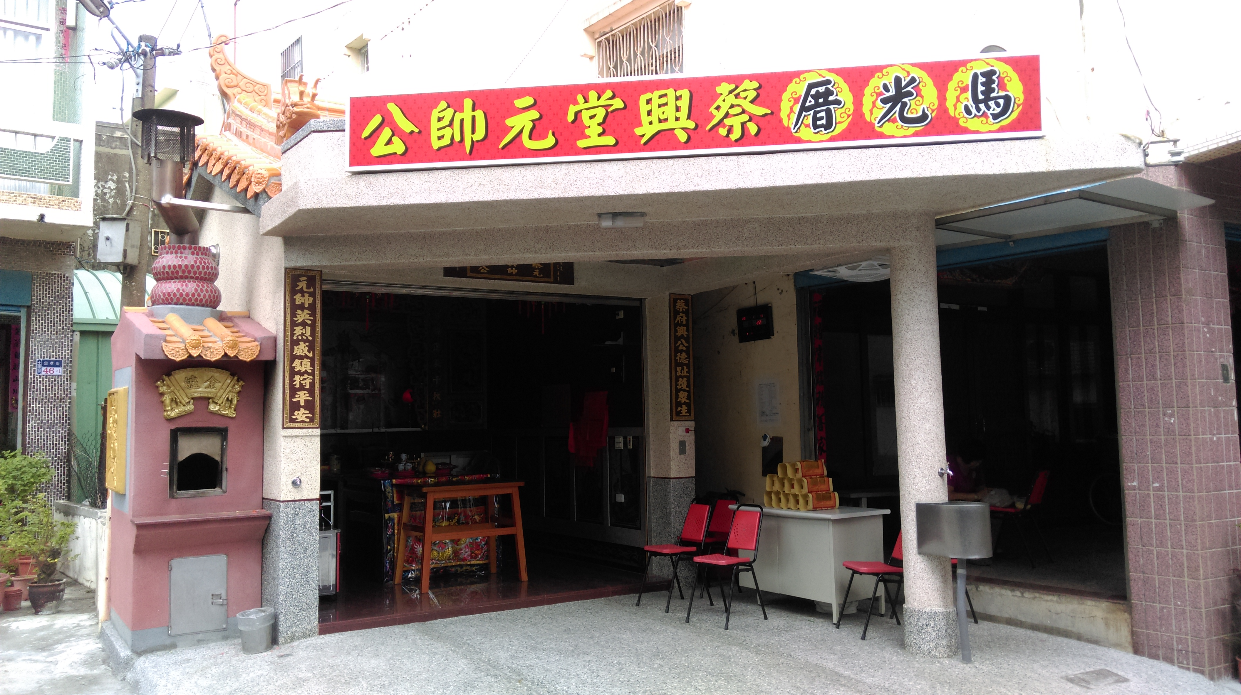 奉祀當地人俗稱的蔡興公或蔡府元帥。 相傳為清初時，自福建來台對抗海盜的蔡氏三兄弟，在今雲林、虎尾一帶相繼戰死。 老大蔡興戰死於馬公厝（馬光），村民感念蔡興元帥之貢獻，開始於其墓之所在祭祀，漸成香火。約1971年前後，村民再於蔡興墓上建祠供奉，稱之「善德堂」，並於2015年4月重建，同年8月落成，改名「馬光厝蔡興堂元帥公」。